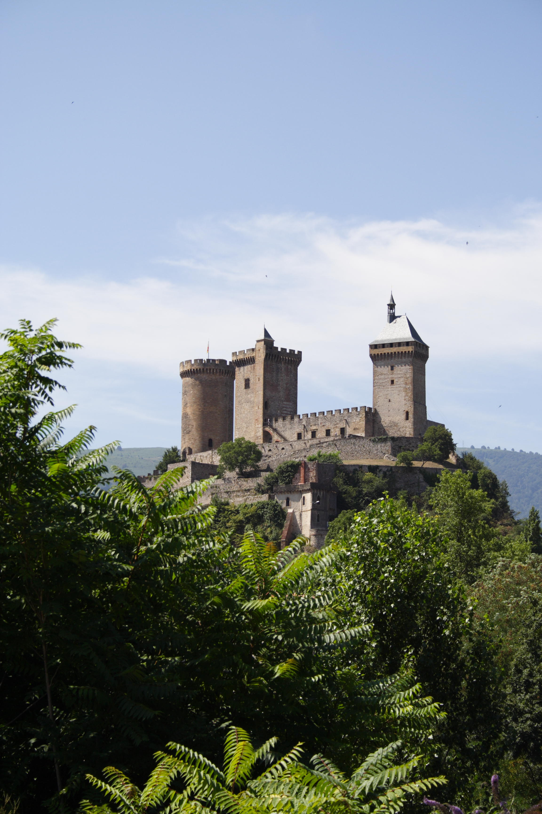 Château de Foix(Foix, France)